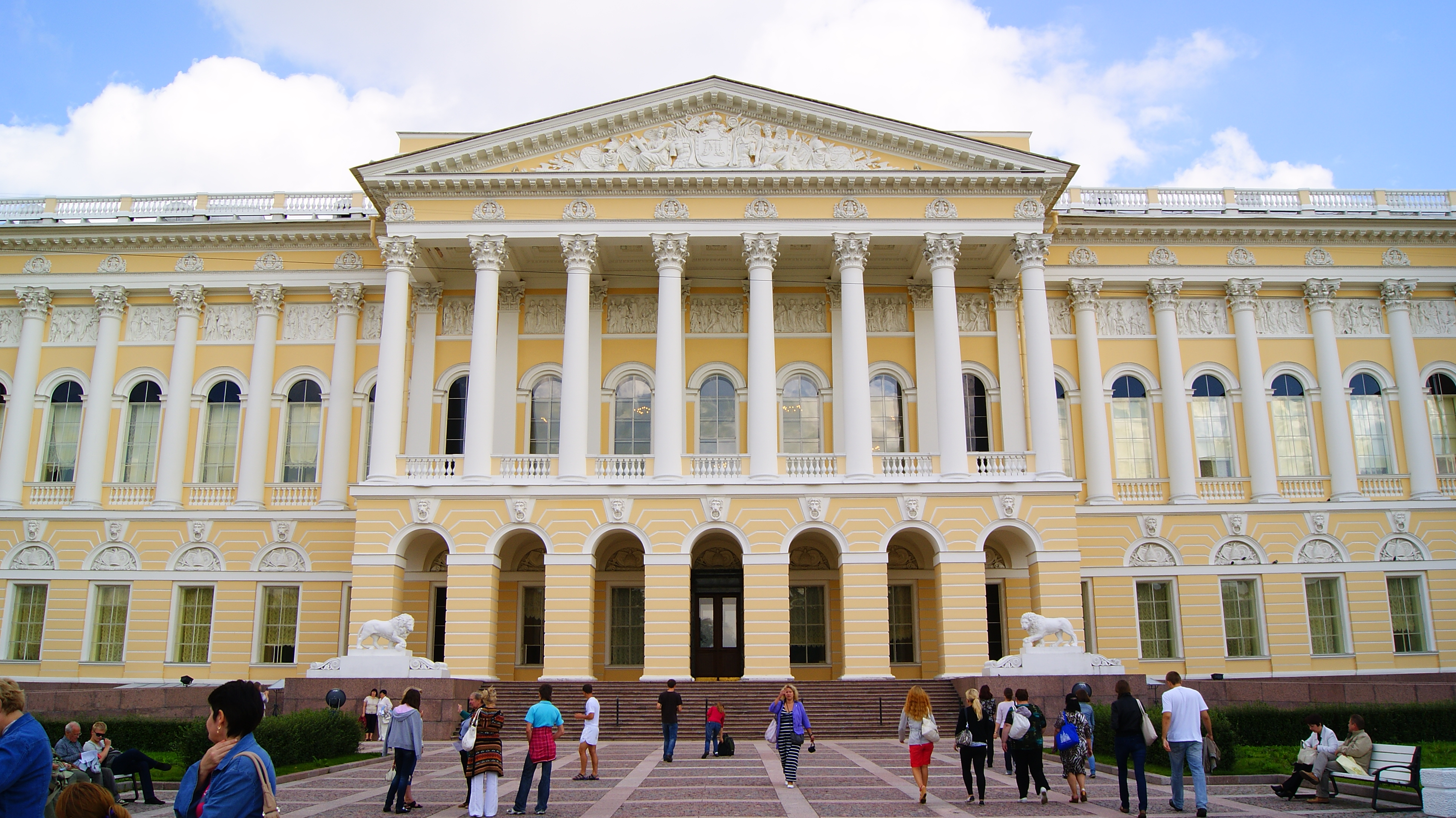 Дворец Великого князя Михаила Павловича (Русский музей императора Александра III)